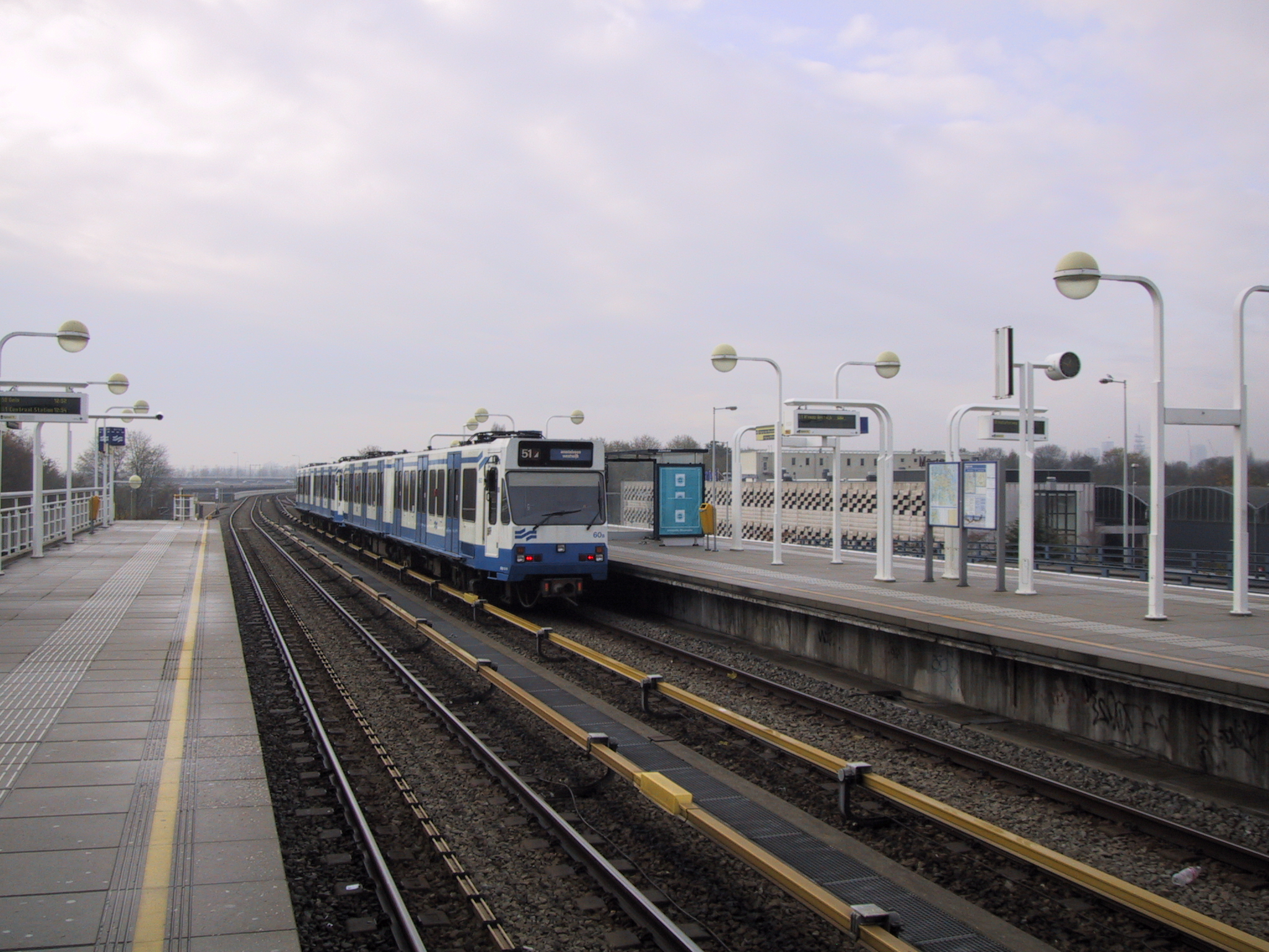 Me - 26/11/2005 - AMS Overamstel